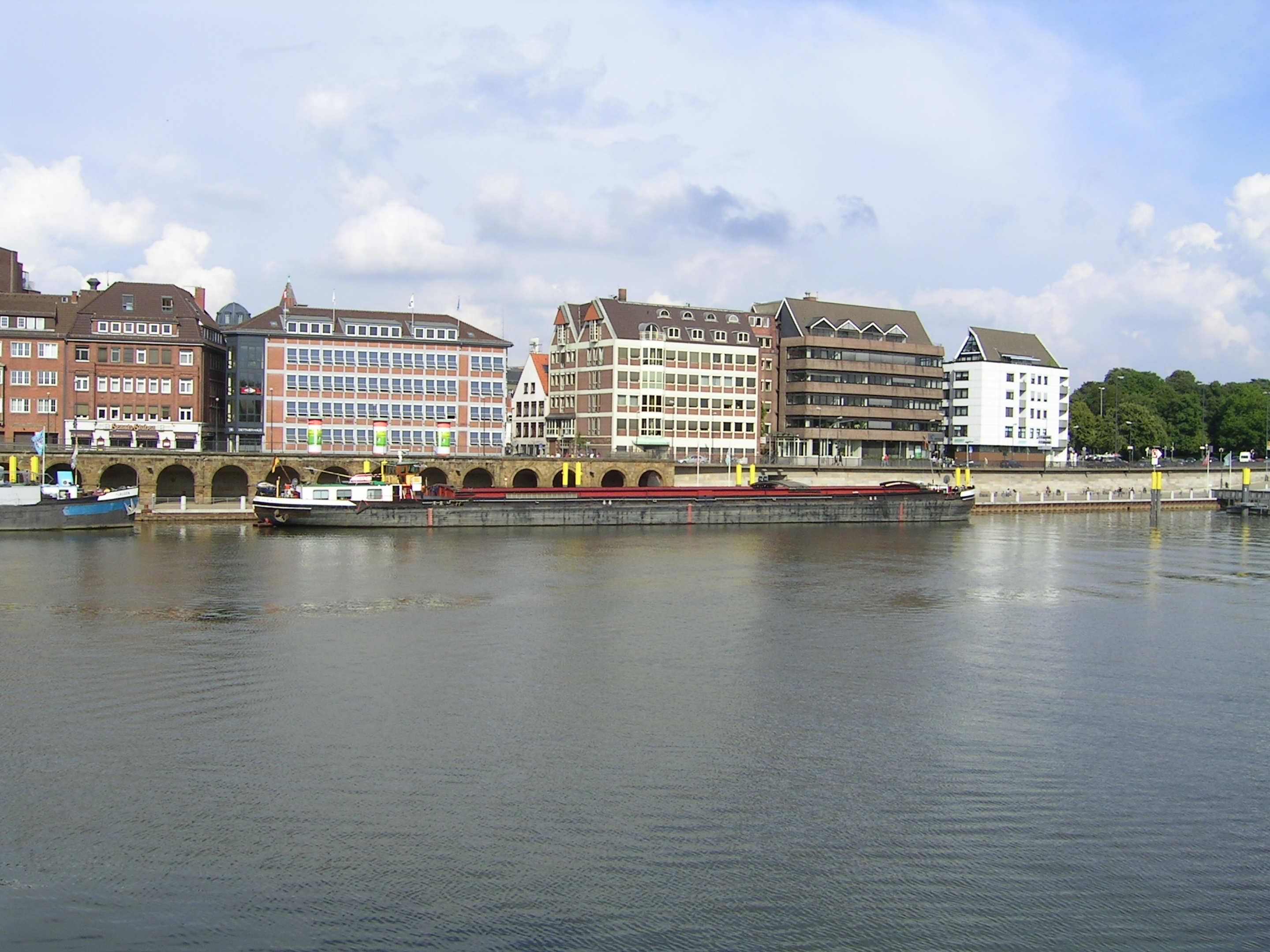 User:Tarawneh/rami